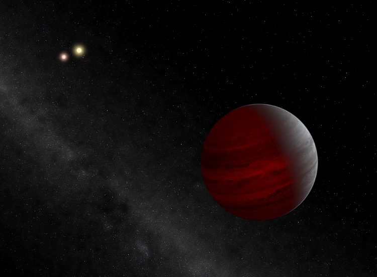 Jupiter chaud de HD 188753